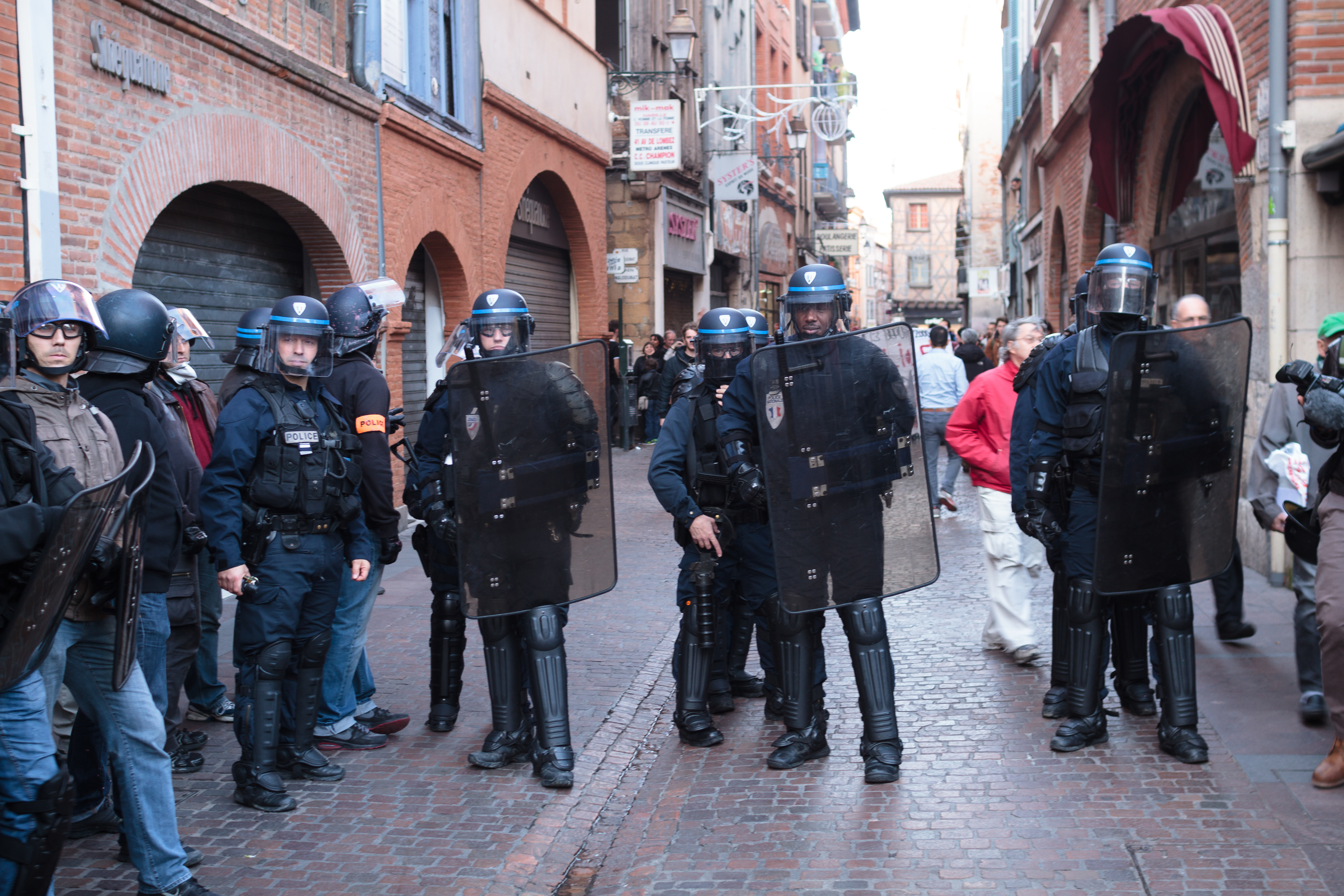 Policiers d'une Compagnie de sécurisation et d'intervention filtrant le passage rue des changes Manifestation contre les violences policières, Toulouse, 22 novembre 2014